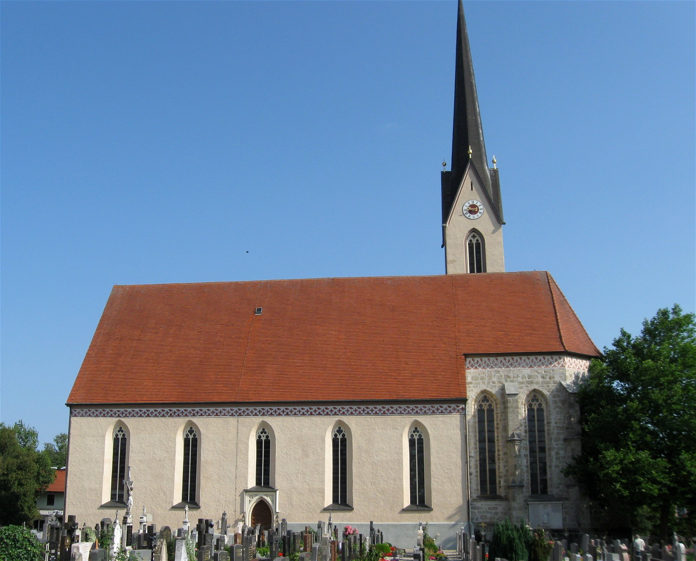 Kienberger Straße 4; Katholische Pfarrkirche St. Laurentius, spätgotische, dreischiffige Hallenkirche, geweiht 1491, Erweiterung des Langhauses 186871; mit Ausstattung.